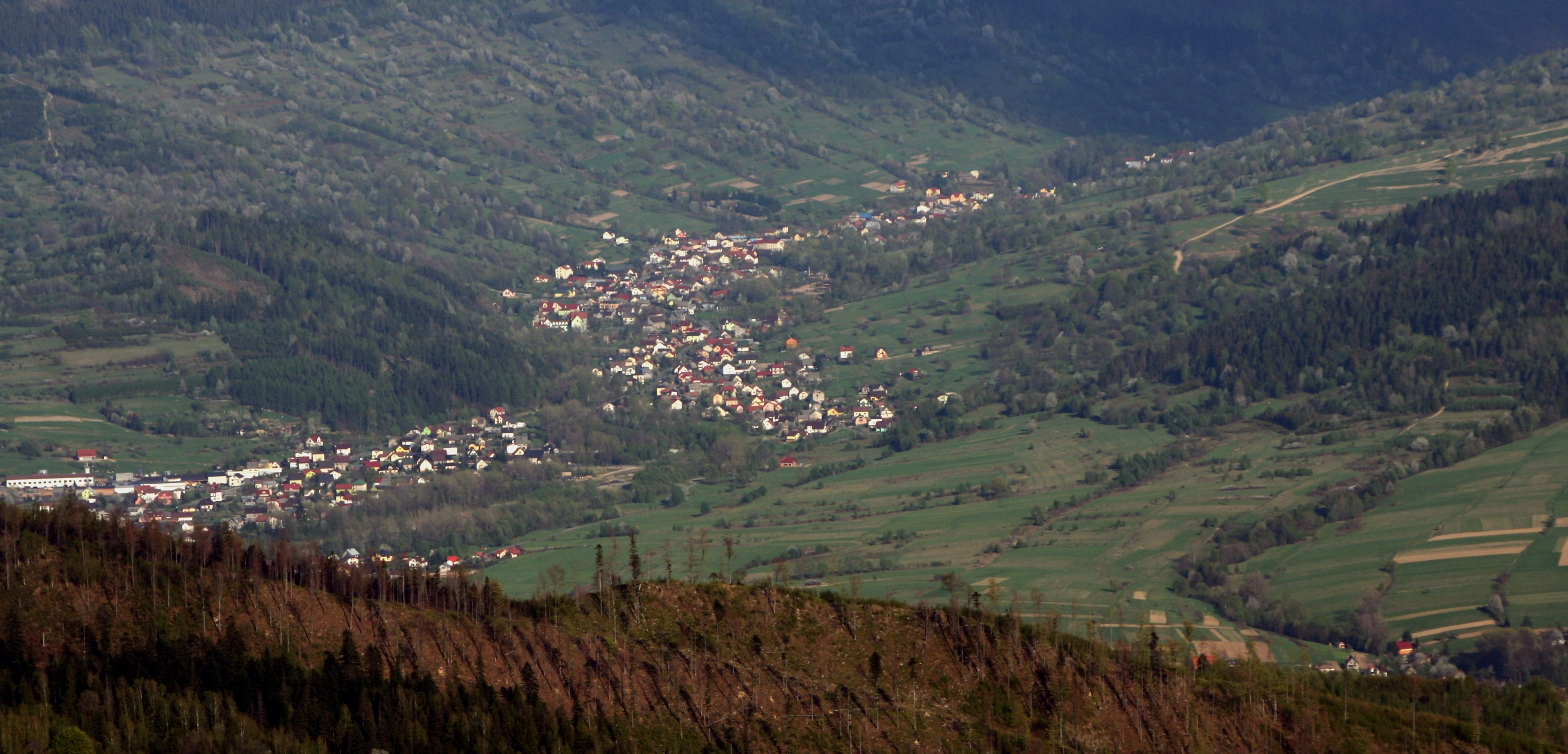 Panorama wsi Żabnica widziana z wieży widokowej na Baraniej Górze